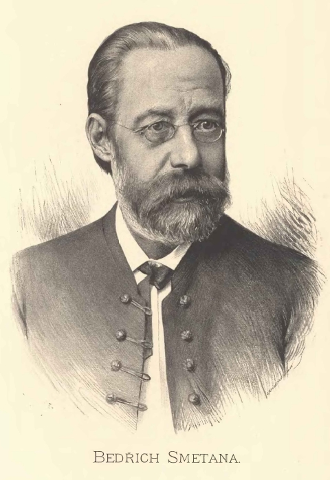 Portréty předních osobností od Jana Vilímka